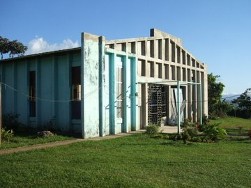 foto de la iglesia de santa elena de general viejo pz